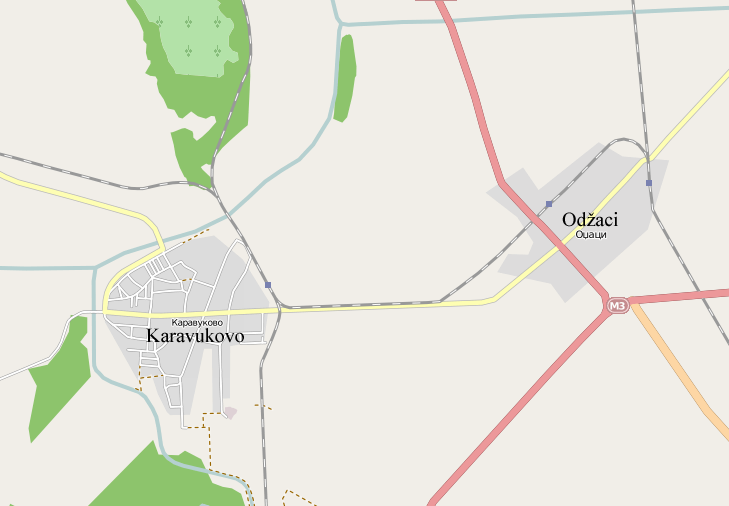 Mapa Odžaka i Karavukova.